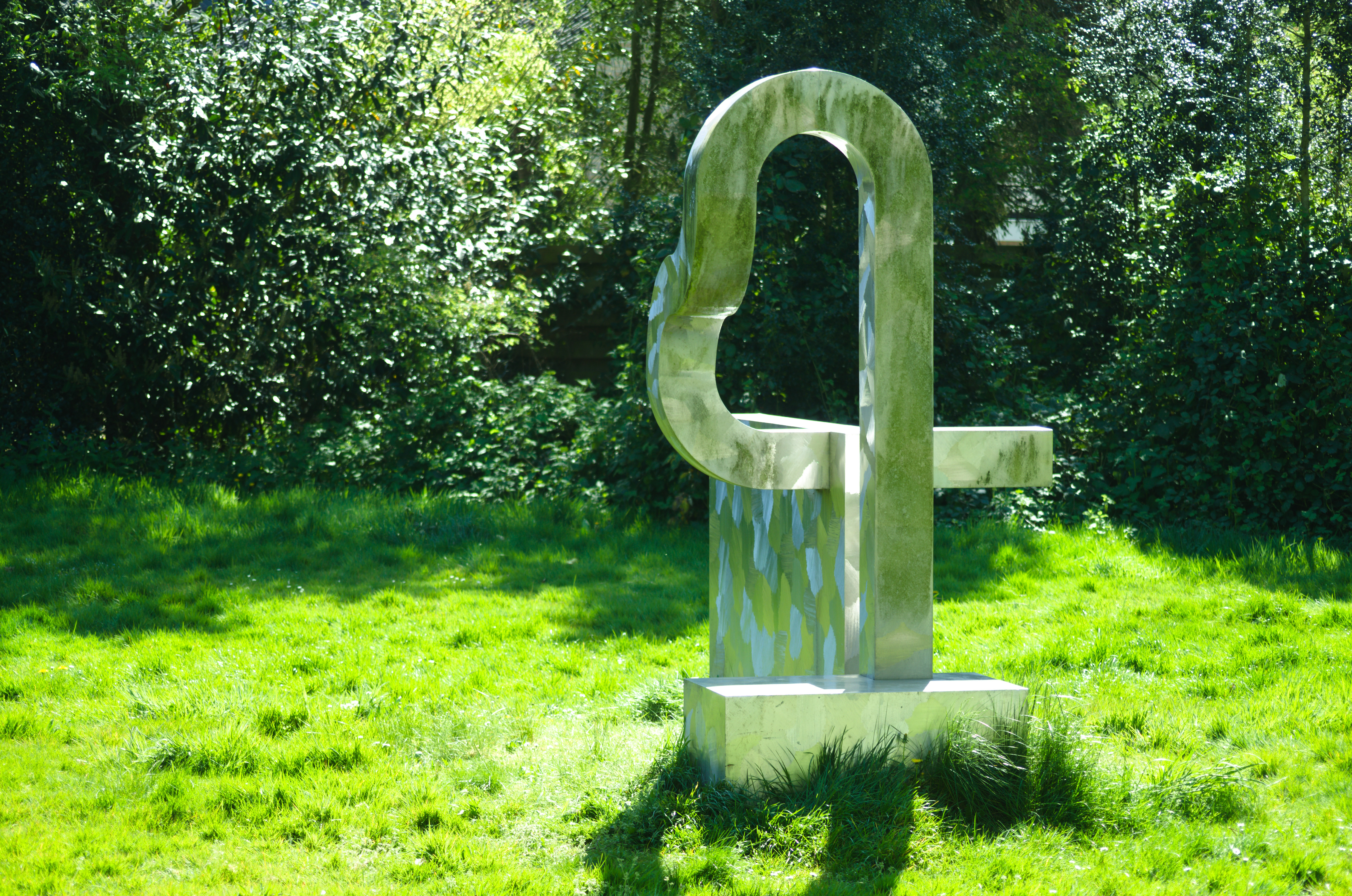 Jan H.G. Baetsen - 'Verbinding' 1980